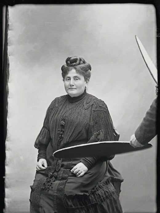 Jeanne Proust, née Weill, tirage de travail de Paul Nadar le 5 décembre 1904. Bibliothèque nationale de France.